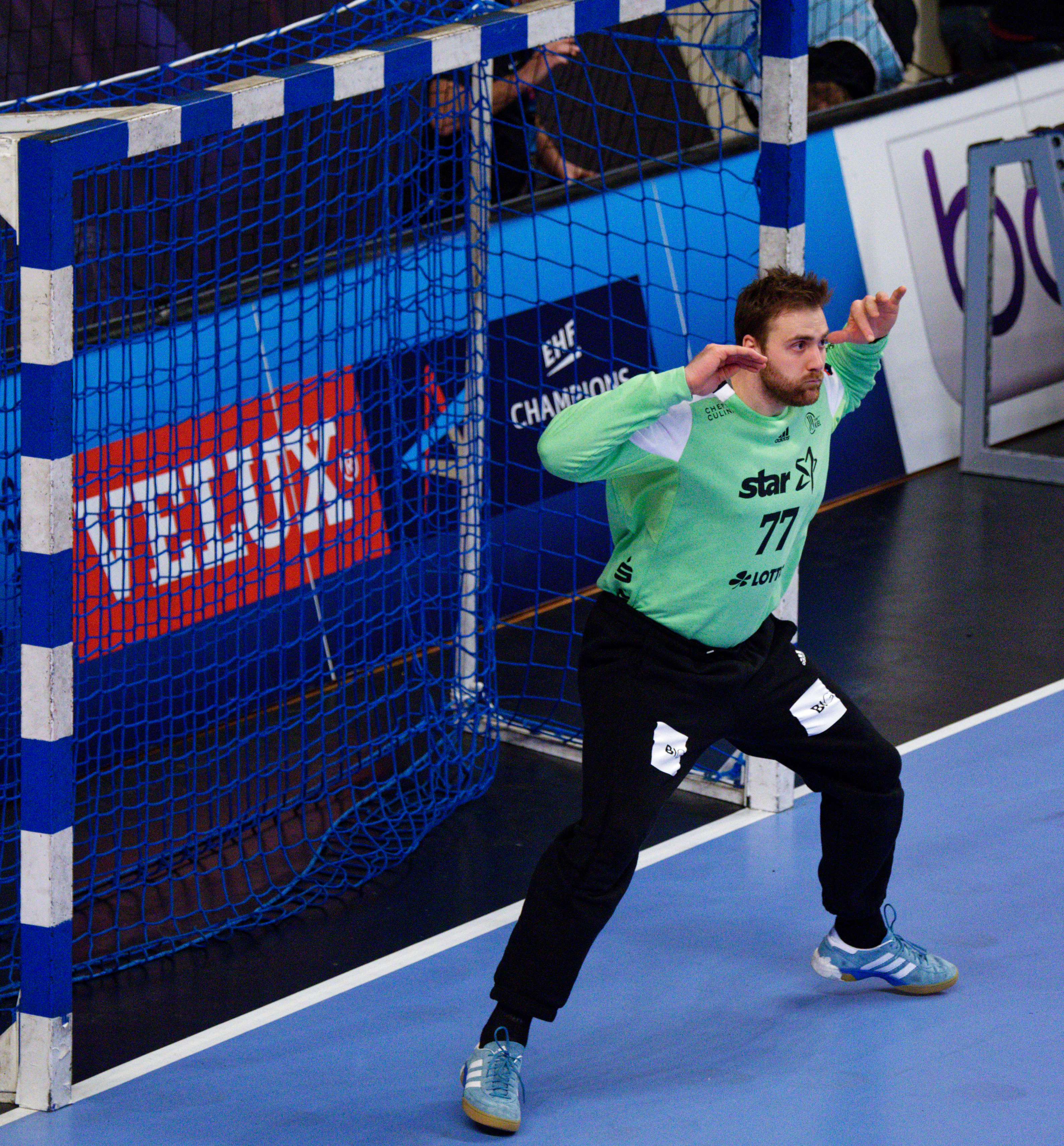 Rencontre de phase de groupe de la ligue des champions 2017/18 entre le PSG et Kiel. A Coubertin, le 4 mars 2018.